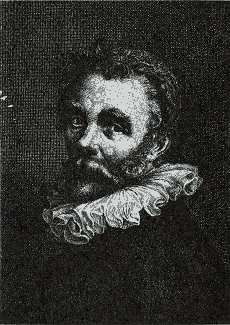 Gravure van Cornelis Ketel door Hendrik Bary